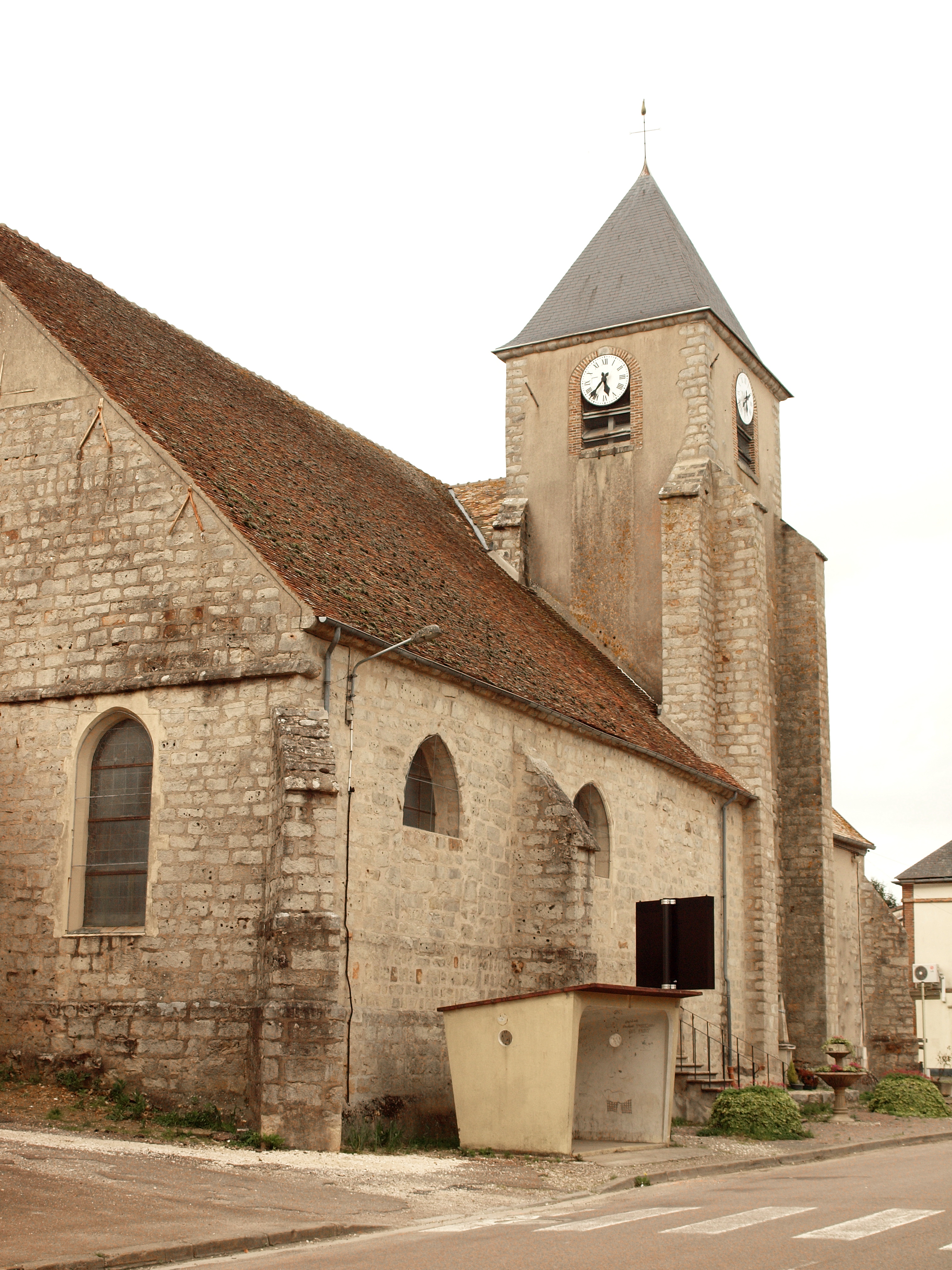 Égriselles-le-Bocage (Yonne, France)